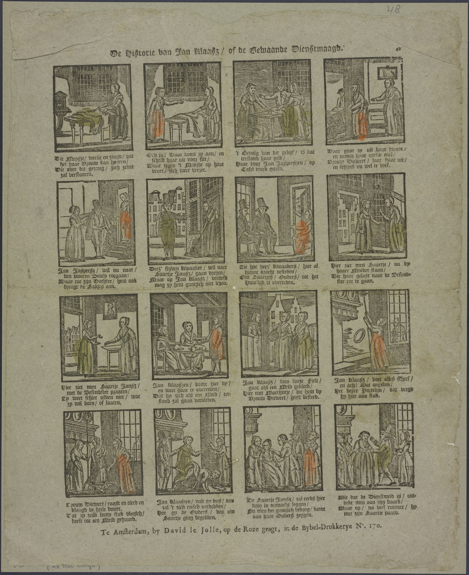 Centsprent met 4 x 4 omkaderde houtsneden, met afbeeldingen over een dienstmeisje, dat wordt ontslagen door vrouw Diewert. Een stijve 'kwaaker' gaat uit vrijen naar Saartje Jansz (dochter van vrouw Diewert) maar Saartje is verliefd op Jan Klaasz. Saartje gaat met een 'besteedster' (werkbemiddelaarster) praten. Jan Klaasz komt erbij en gaat als meid verkleed werken bij de ouders van Saartje. Dat gaat niet goed en vrouw Diewert raast en tiert dat ze 'zulk lomp stuk vleesch' als meid heeft gehuurd. Jan Klaasz valt en het bedrog wordt ontdekt. Saartje valt flauw en uiteindelijk worden Saartje en Klaas verenigd. Bevat vierregelige rijmende onderschriften.